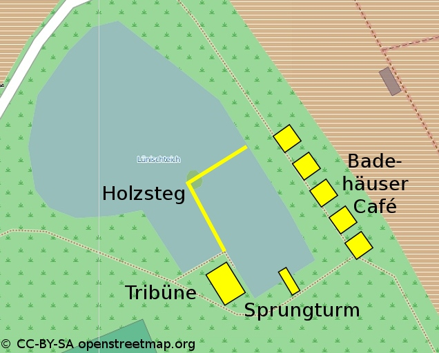 Karte des Lünischteichs ( Stand 2014) mit Eintragungen der Bauwerke der früheren Badeanstalt.